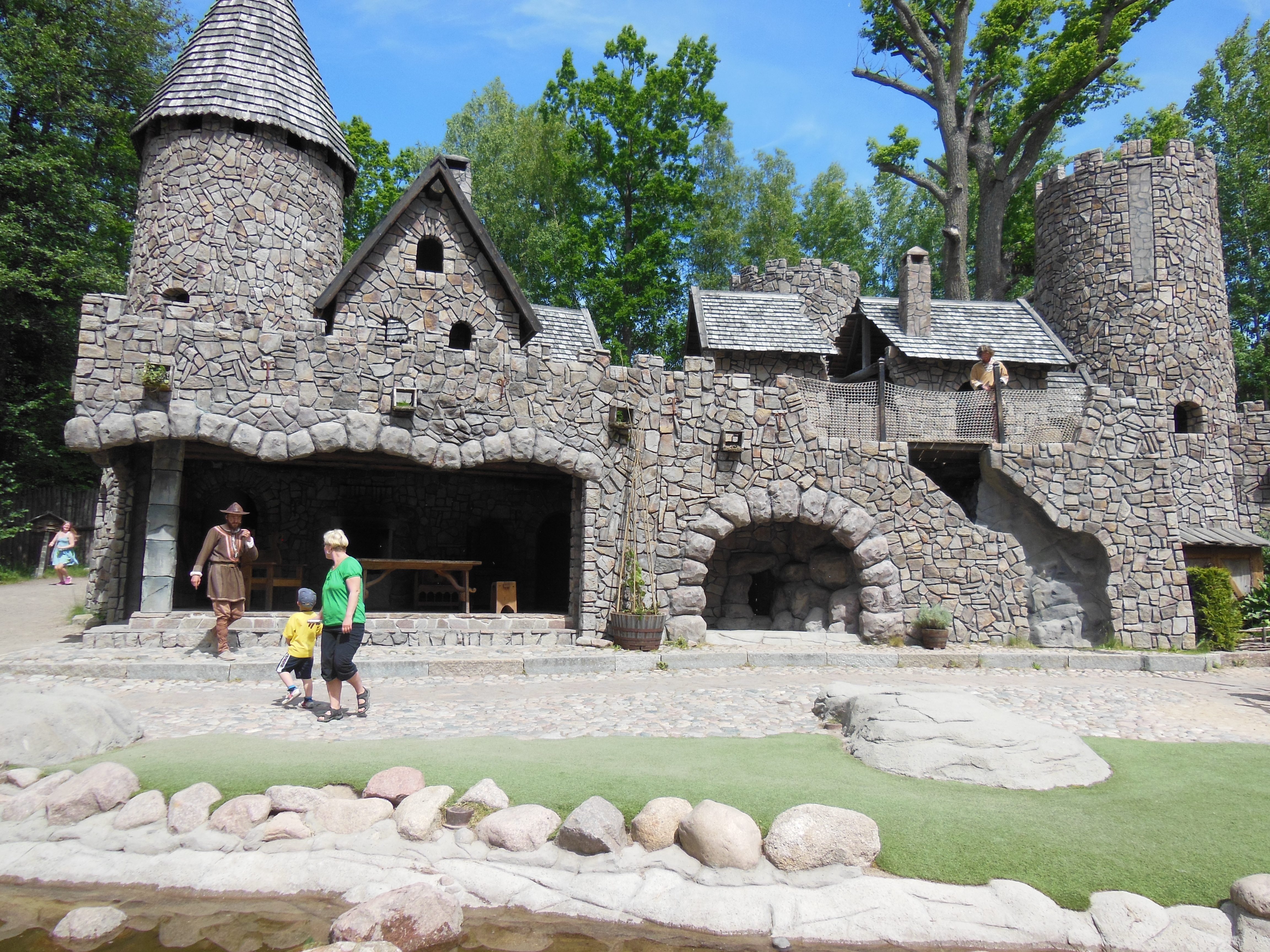 Mattisborgen, Astrid Lindgrens Värld 2015.